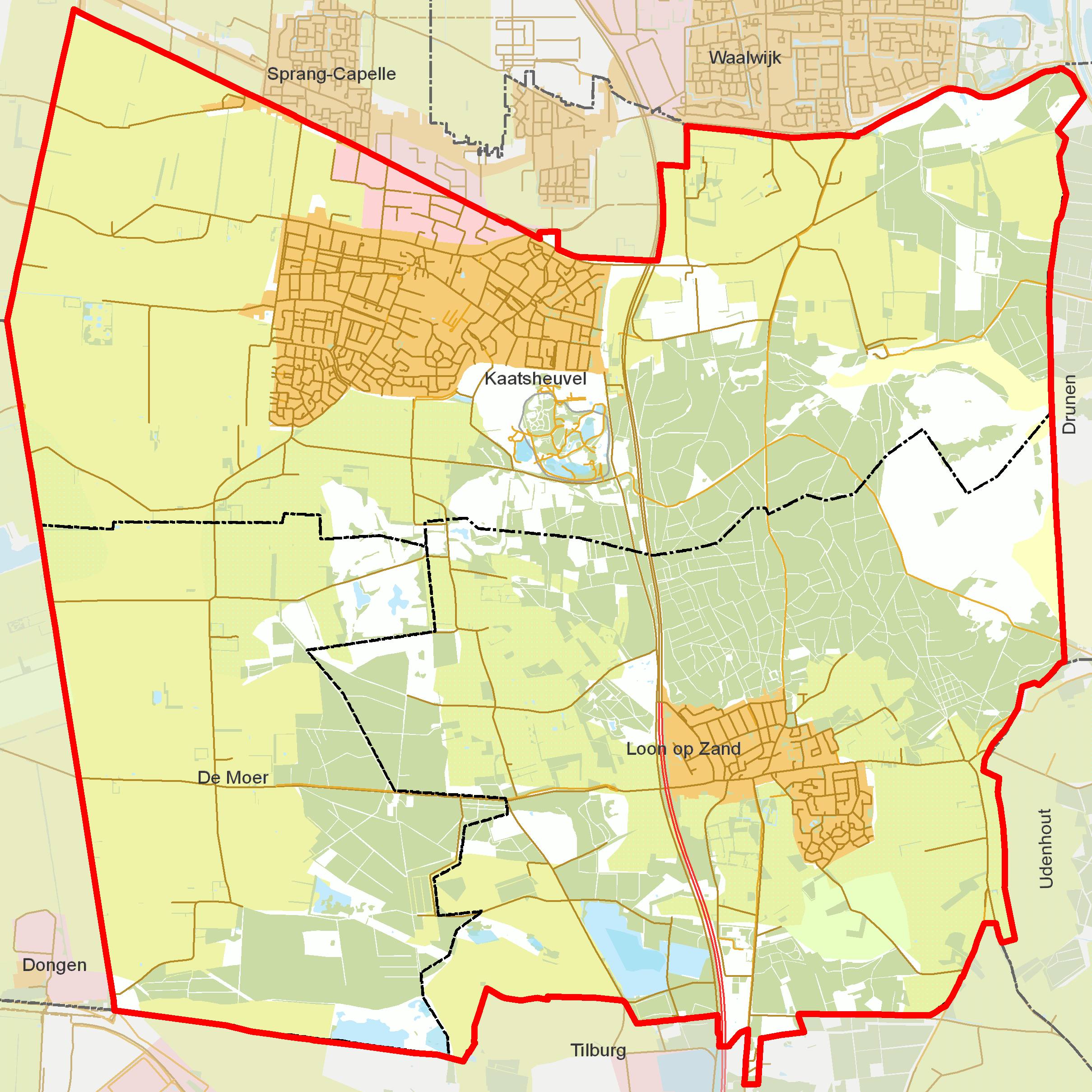 BAG woonplaatsen - Gemeente Loon op Zand.png